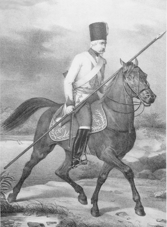 Конный рядовой Елисаветградского Пикинерного полка, с 1764 по 1776 г.